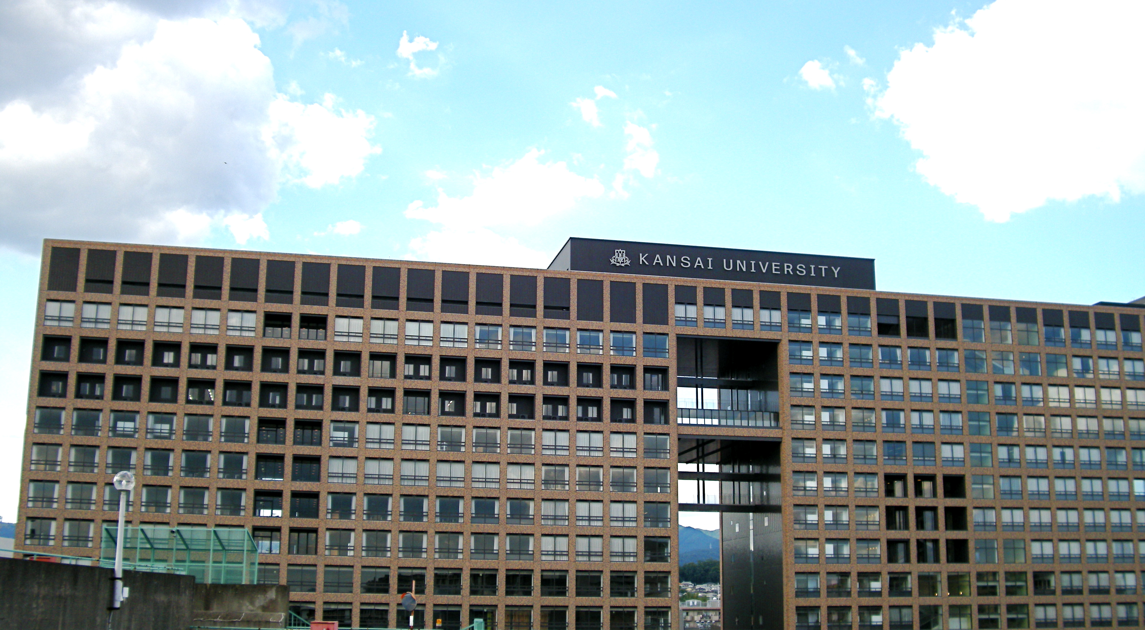 Kansai University Muse Campus (Takatsuki, Osaka, Japan)